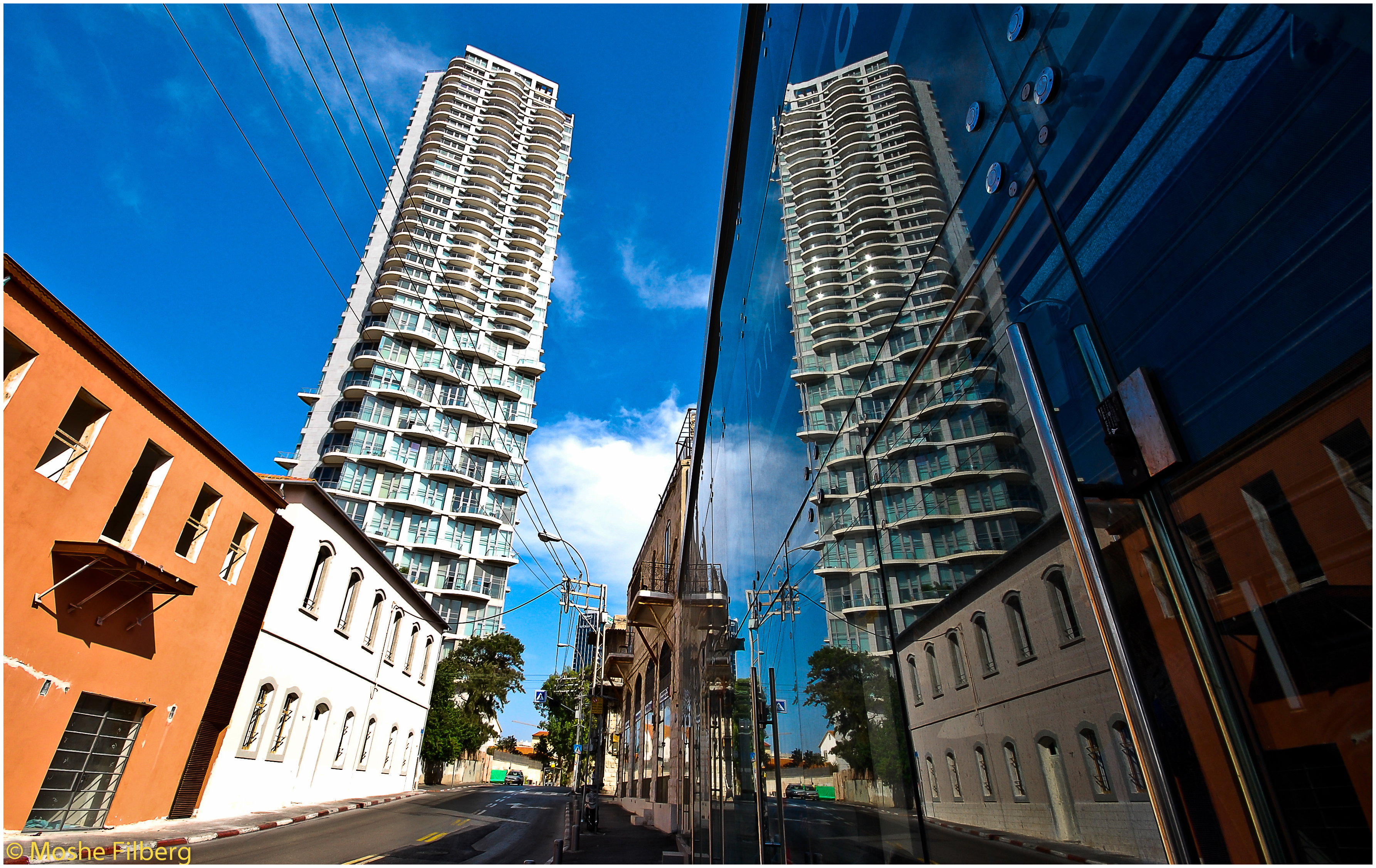 רחוב אילת ביפו הוא המשכו של דרך יפו עד שדרות ירושלים. הרחוב מהווה גבול בין השכונות: נווה צדק, פלורנטין, המושבה האמריקאית-גרמנית ביפו, ושכונת נוגה.